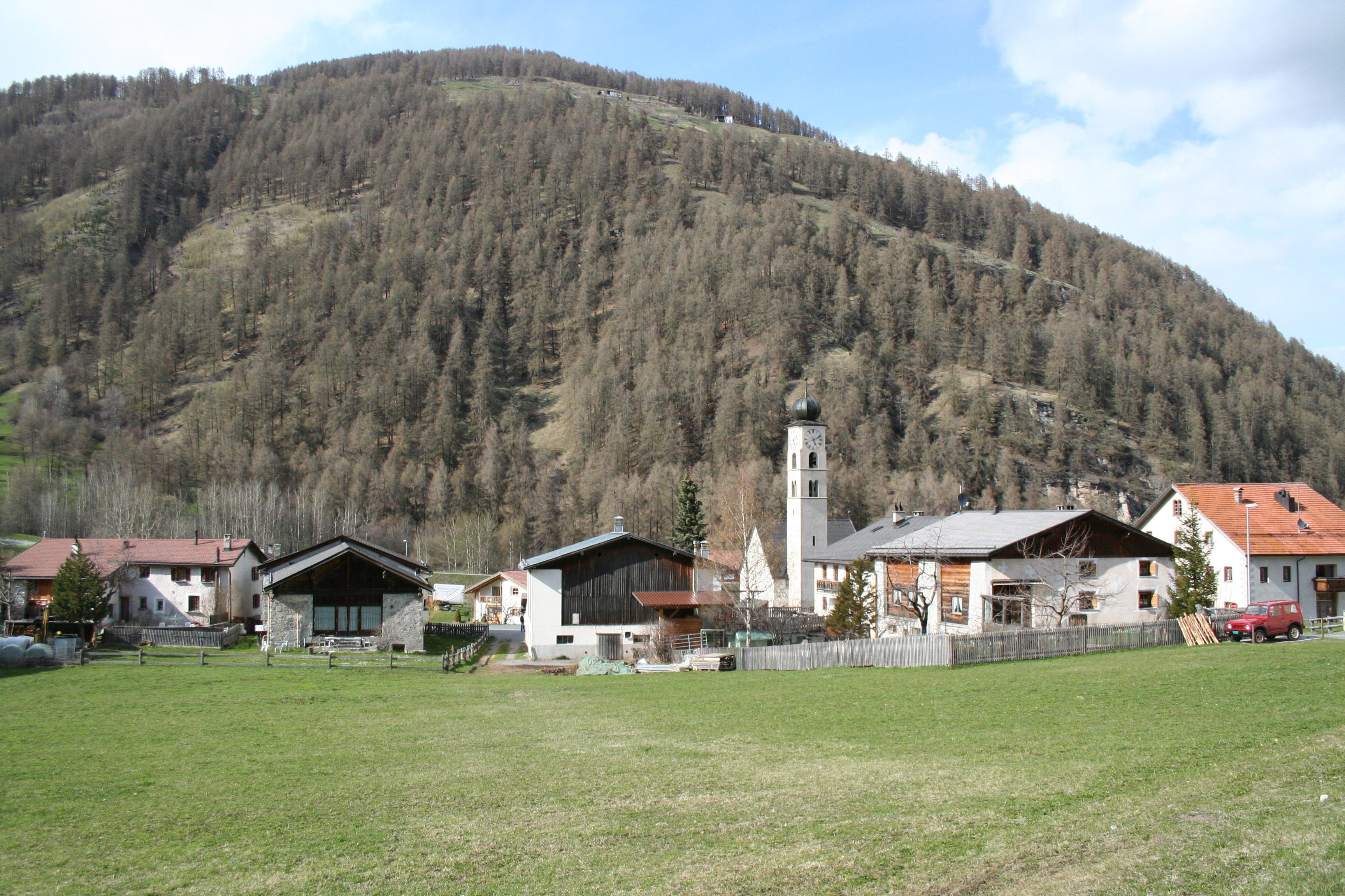 Valchava